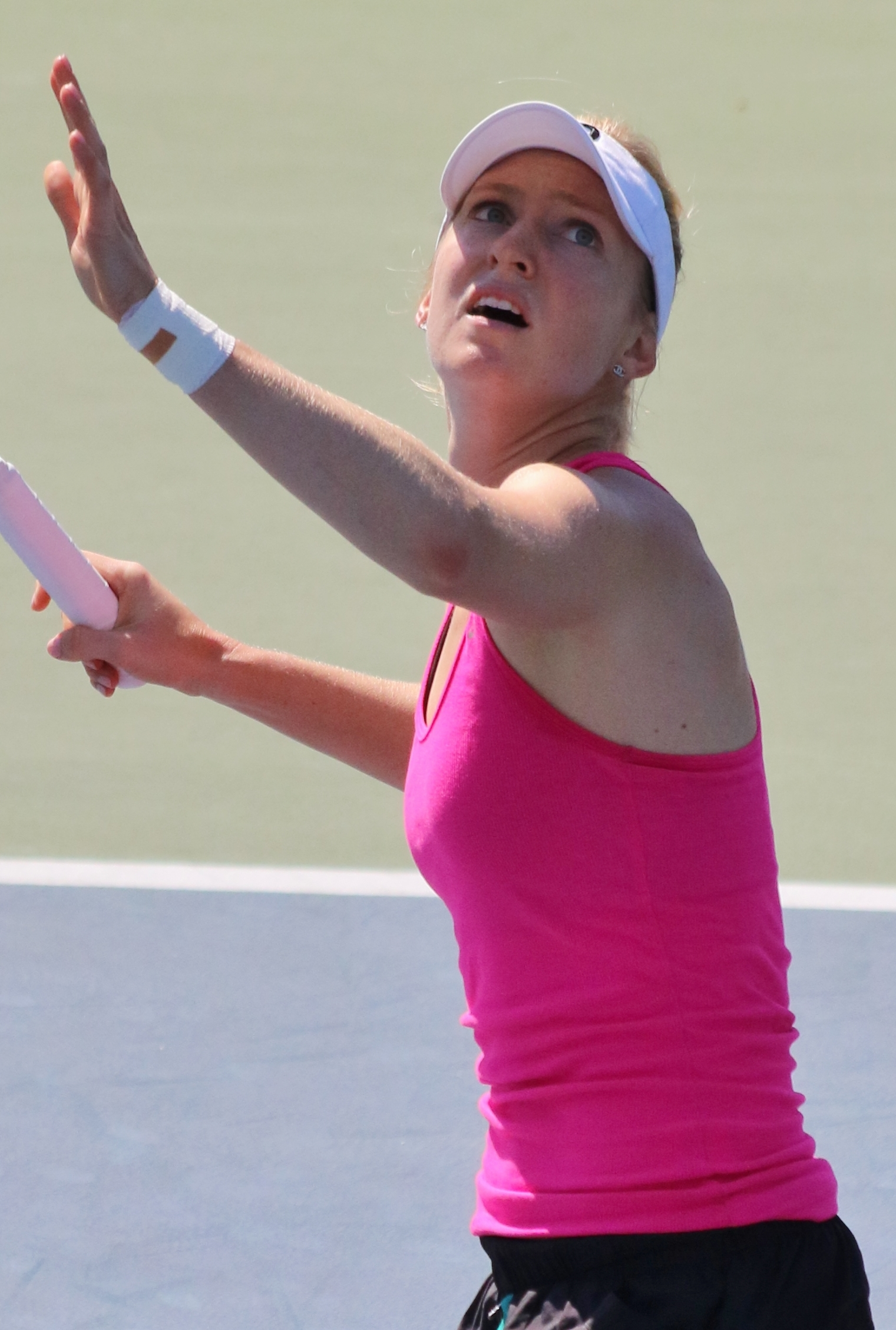 Boserup US16 (14)